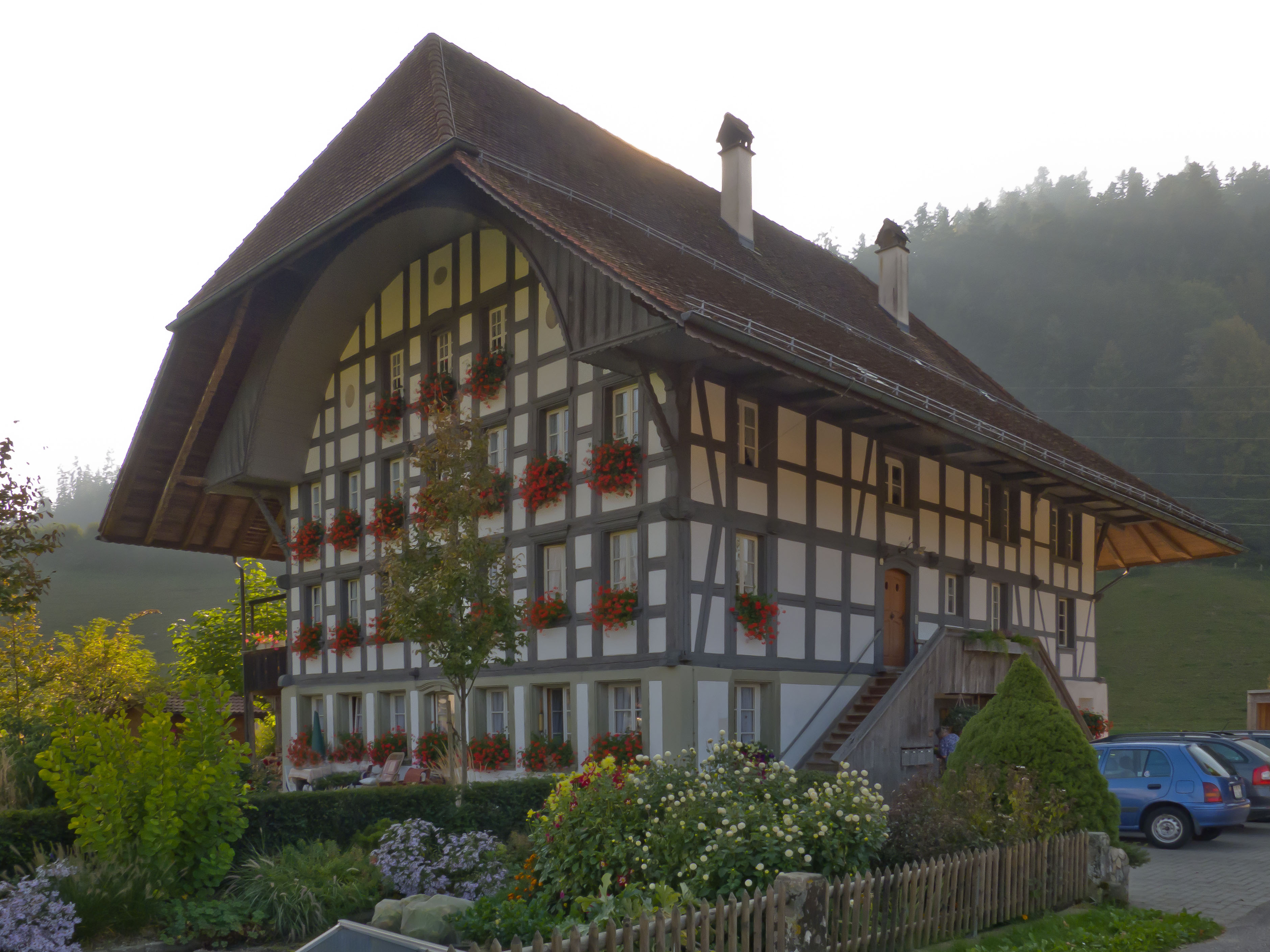 Lauperswil, Herrenbauernhaus Chalchmatt, erbaut 1833